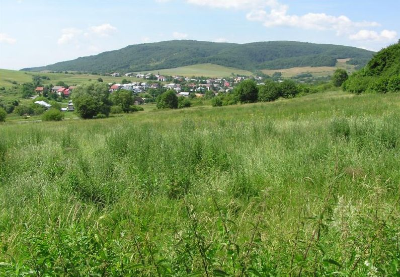 Celkový pohľad